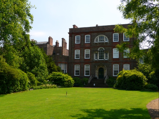 Wisbech - Peckover House